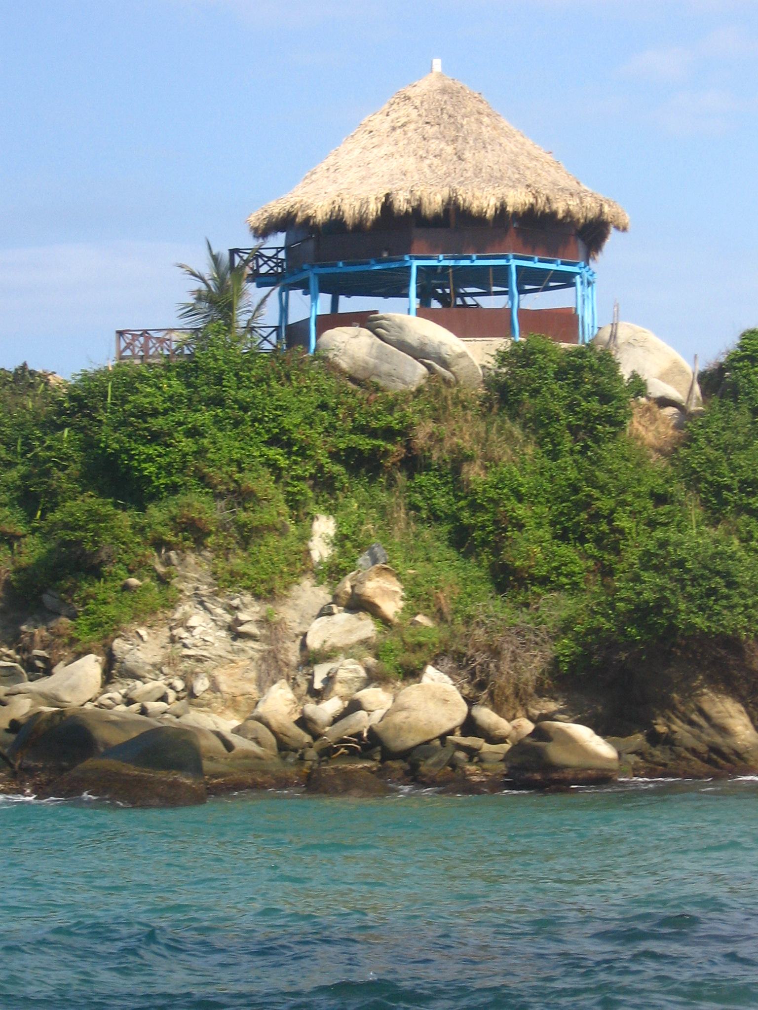 Foto de Cabo, Parque Natural Tayrona, Colombia